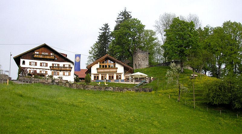 Burg Werdenstein bei Immenstadt im Allgäu (Landkreis Oberallgäu, Bayerisch-Schwaben). Ansicht von Südwesten. Eigene Aufnahme, Mai 2008 / Werdenstein castle near Immenstadt im Allgäu (Landkreis Oberallgäu, Bavaria, Germany). View from the south west. Own photo, May 2008